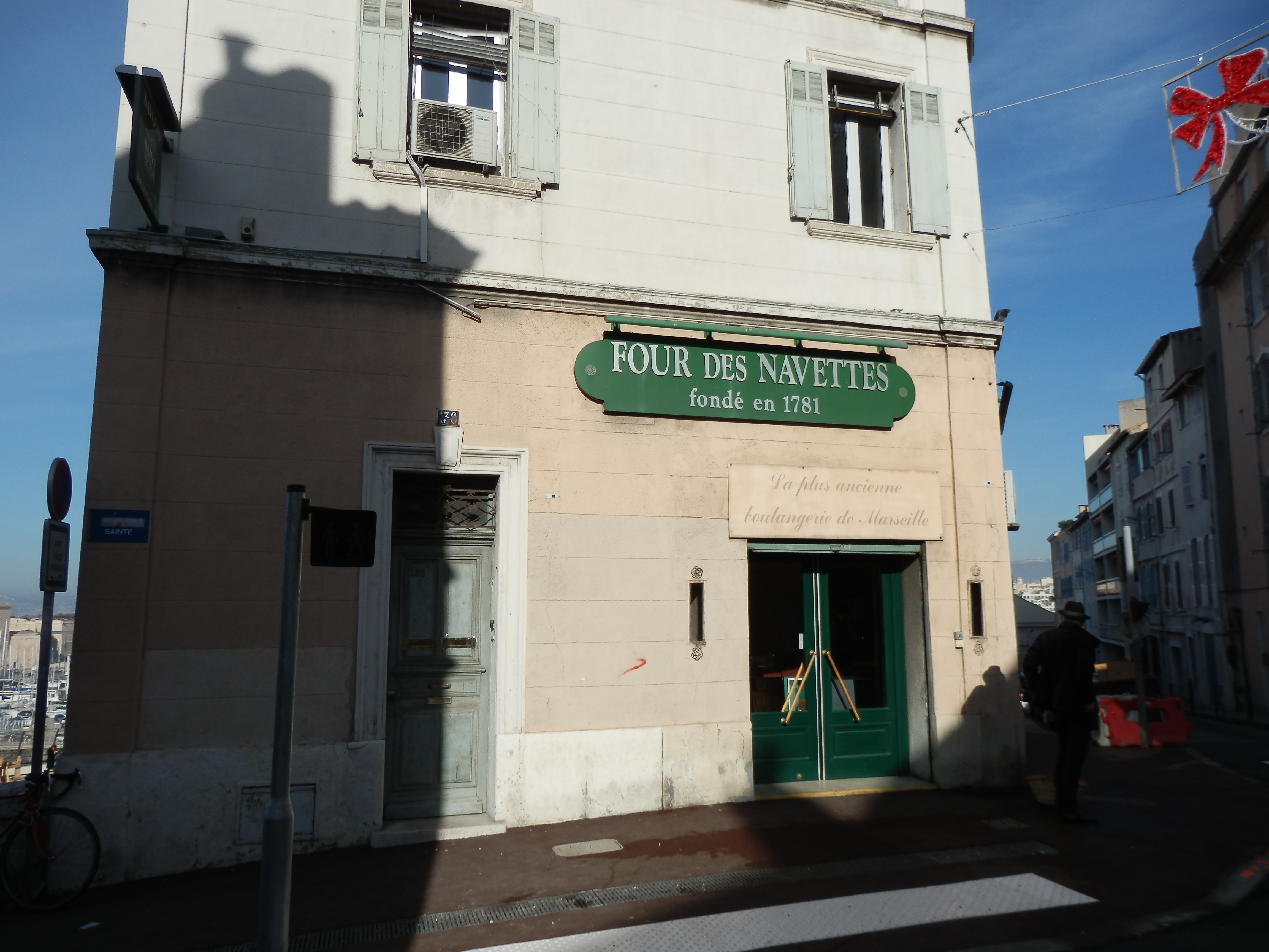 panificio-pasticceria con forno del secolo XVIII - 136, Rue Sainte (Marsiglia)